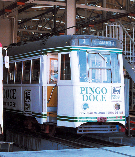 土佐電鉄 整備中の910形（右）と600形606（左）